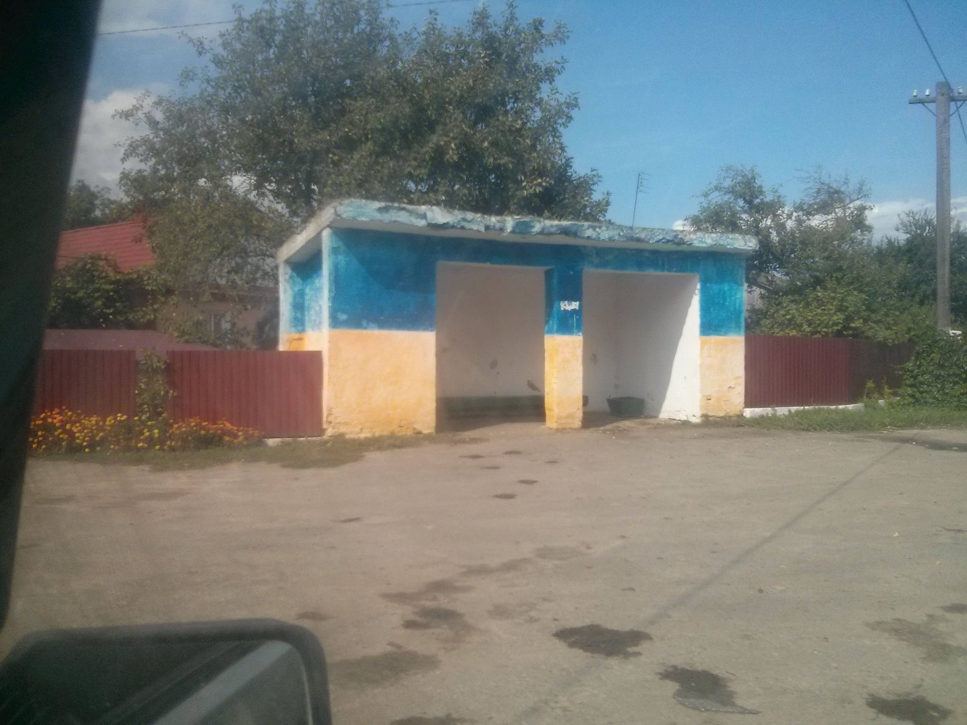 Ільпибоки Рівненська область